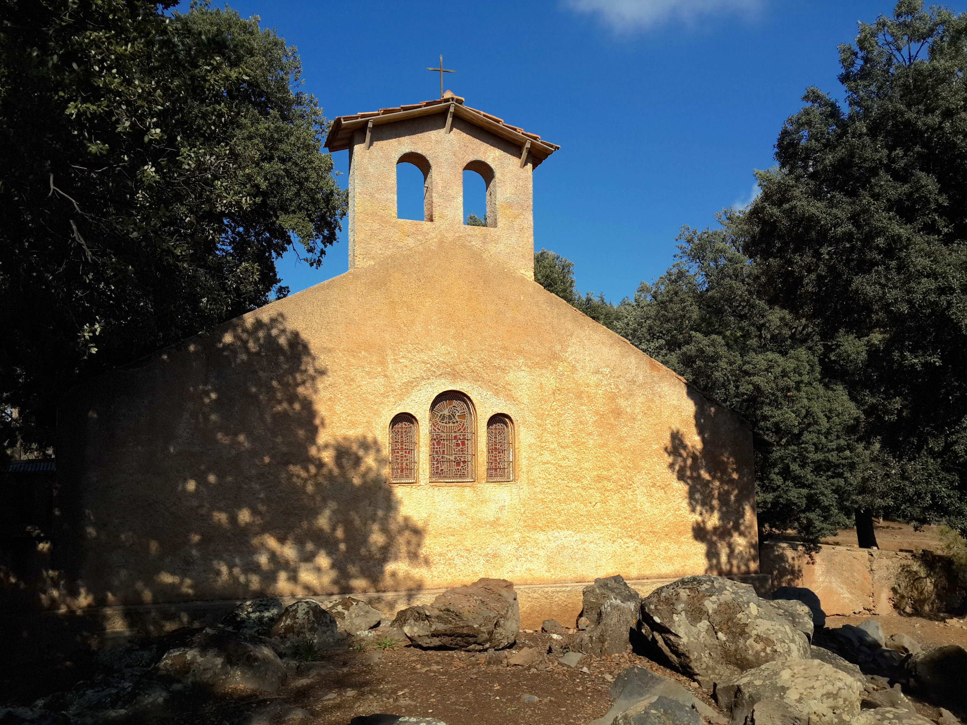 La chapelle de l'ancien monastère de Tioumliline